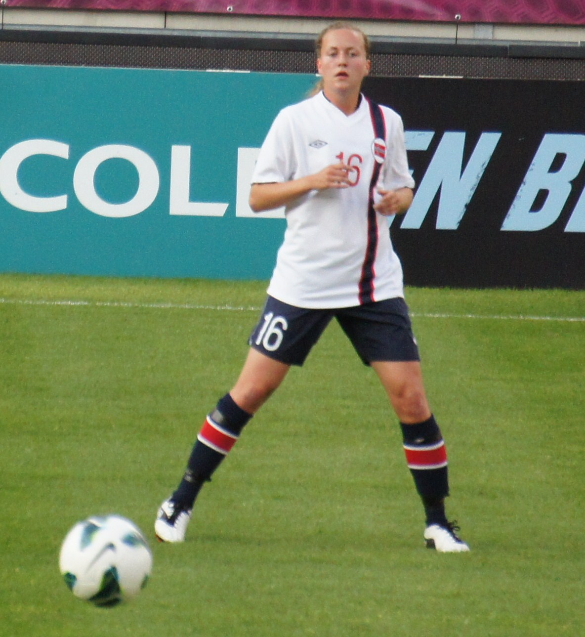 Kristine Wigdahl Hegland En équipe de Norvège.